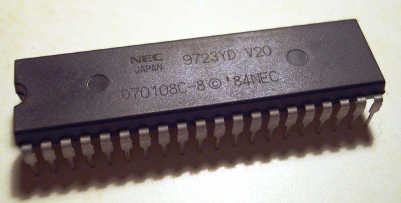 NEC V20 microprocessor